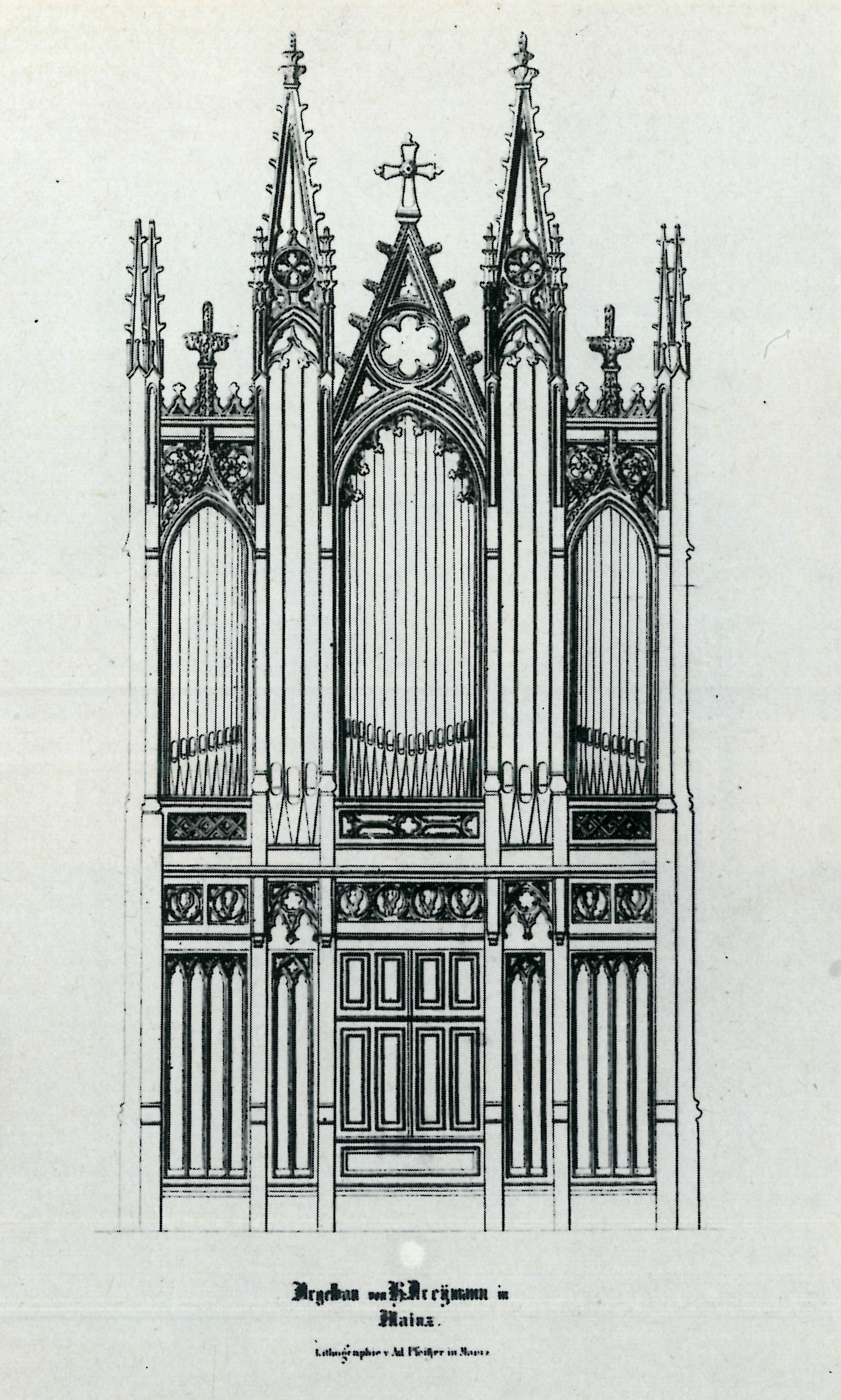 Lithographierte Entwurfszeichnung eines Orgelprospektes von Hermann Dreymann, Pfarramt Leeheim